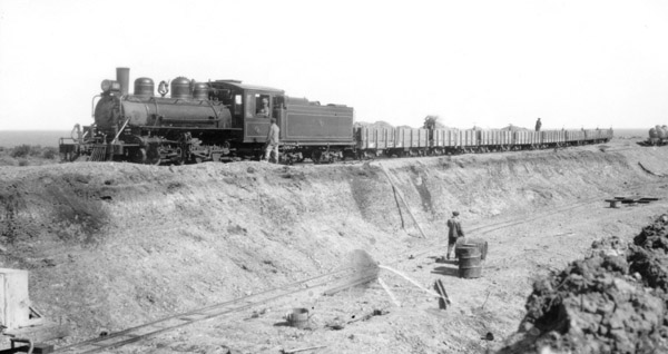 Vista de una Baldwin 2-8-2/4-4 transportanto cargas desde Punta Piedras